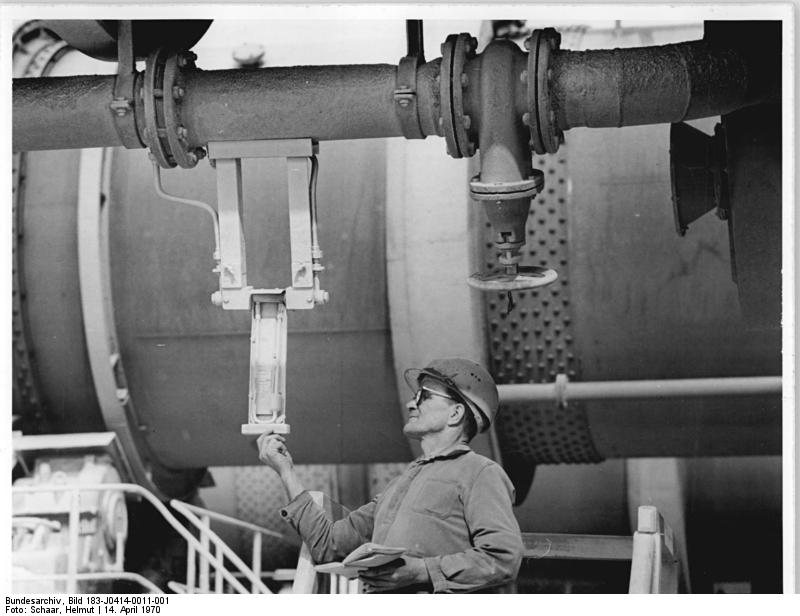 Zentralbild-Schaar 14.4.70 Halle: Gipsschwefelsäurewerk des CKB Bitterfeld holt Planrückstände auf-Brenner Rudi Birkner, einer der Besten seines Kollektivs, bei der Kontrolle der Luftmengen am Zungenblasebalg eines Drehrohrofens. Seit einigen Tagen laufen die vier mächtigen Drehrohröfen der Gipssäure-Anlage im Chemiekombinat Bitterfeld wieder mit voller Belastung. Die Brigaden der Anlage haben in enger sozialistischer Gemeinschaftsarbeit die Kräfte formiert, um während des Winters entstandenen Planschulden bei Schwefelsäure und Zement systematisch abzubauen.